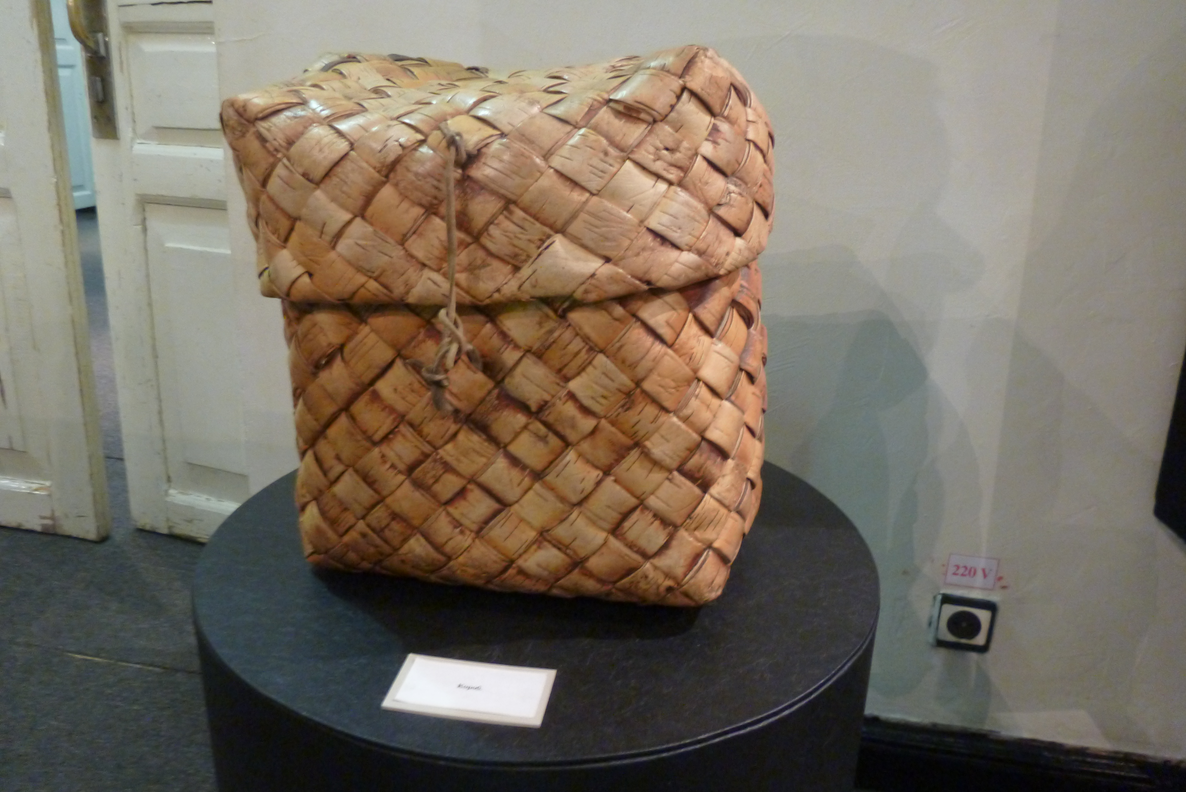 Берестяной короб в Нижнетагильском музее. Фото 2019 года